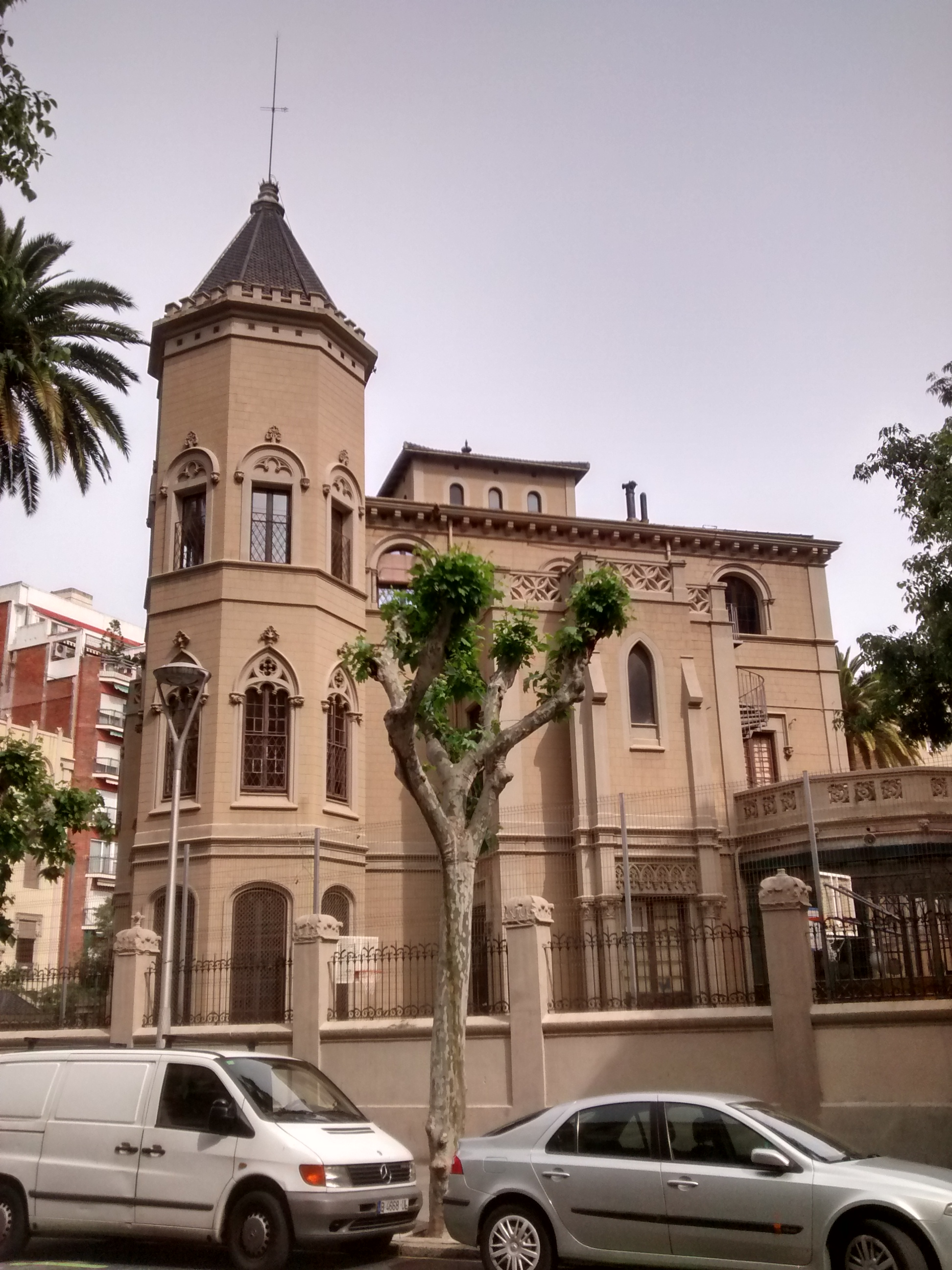 L'Escola Santa Anna a Barcelona.